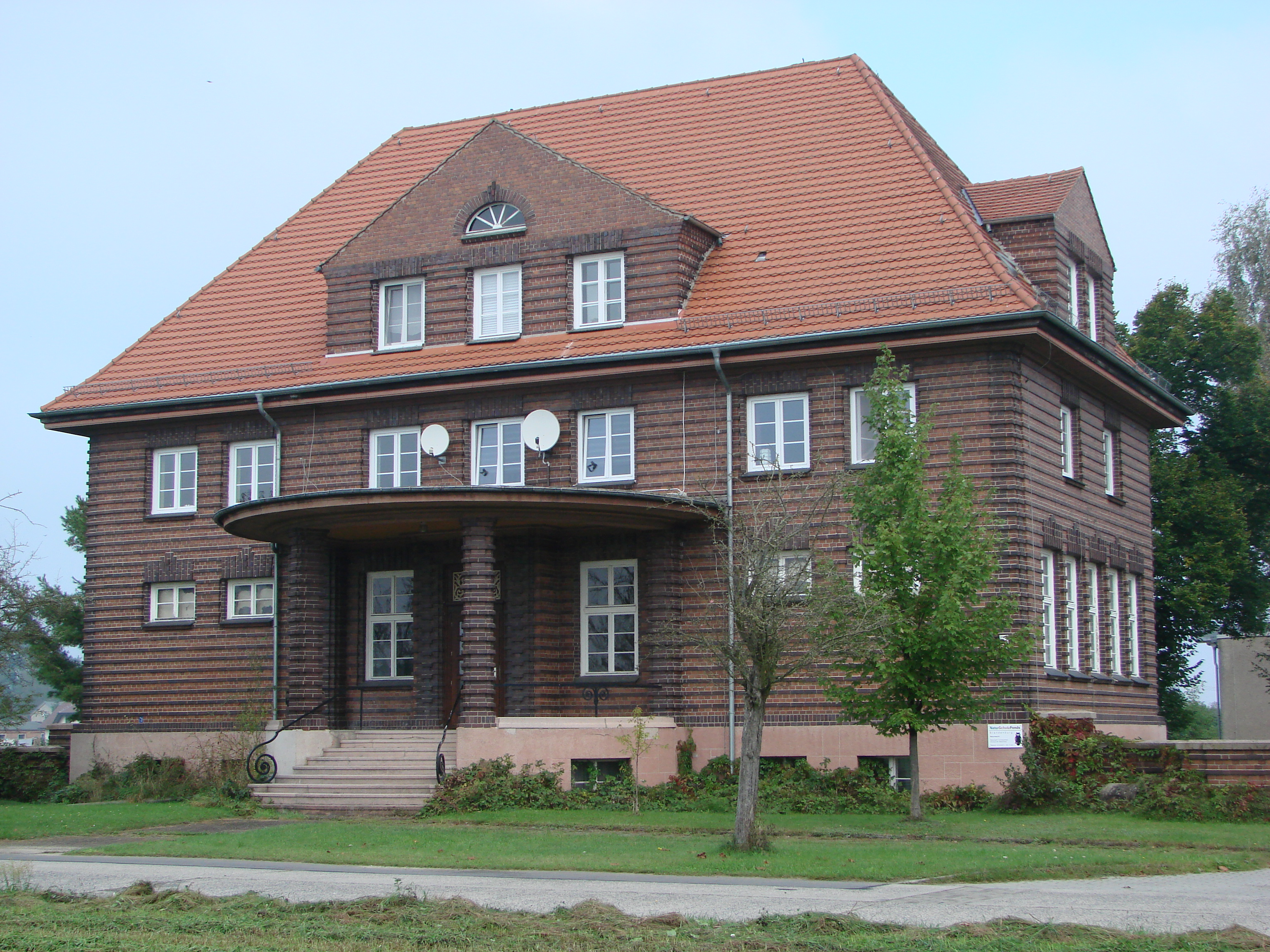 Die Alte Dorfschule wurde 1932 erbaut, Klinkerbau, Baudenkmal; Gemeinde Schenkendöbern